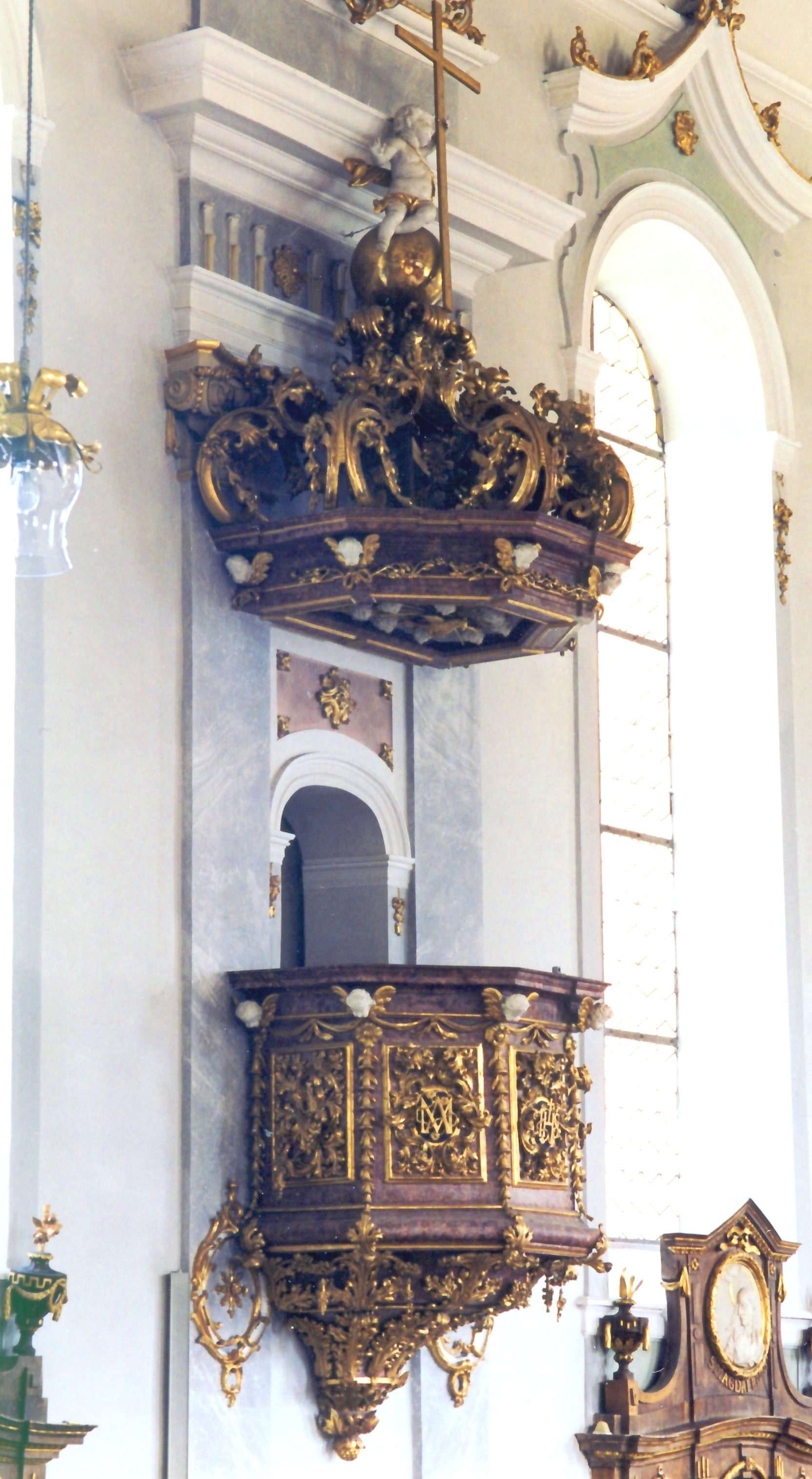 Kanzel von Nikolaus Babel (1643-1728), Pfarrkirche Pfronten, Ostallgäu